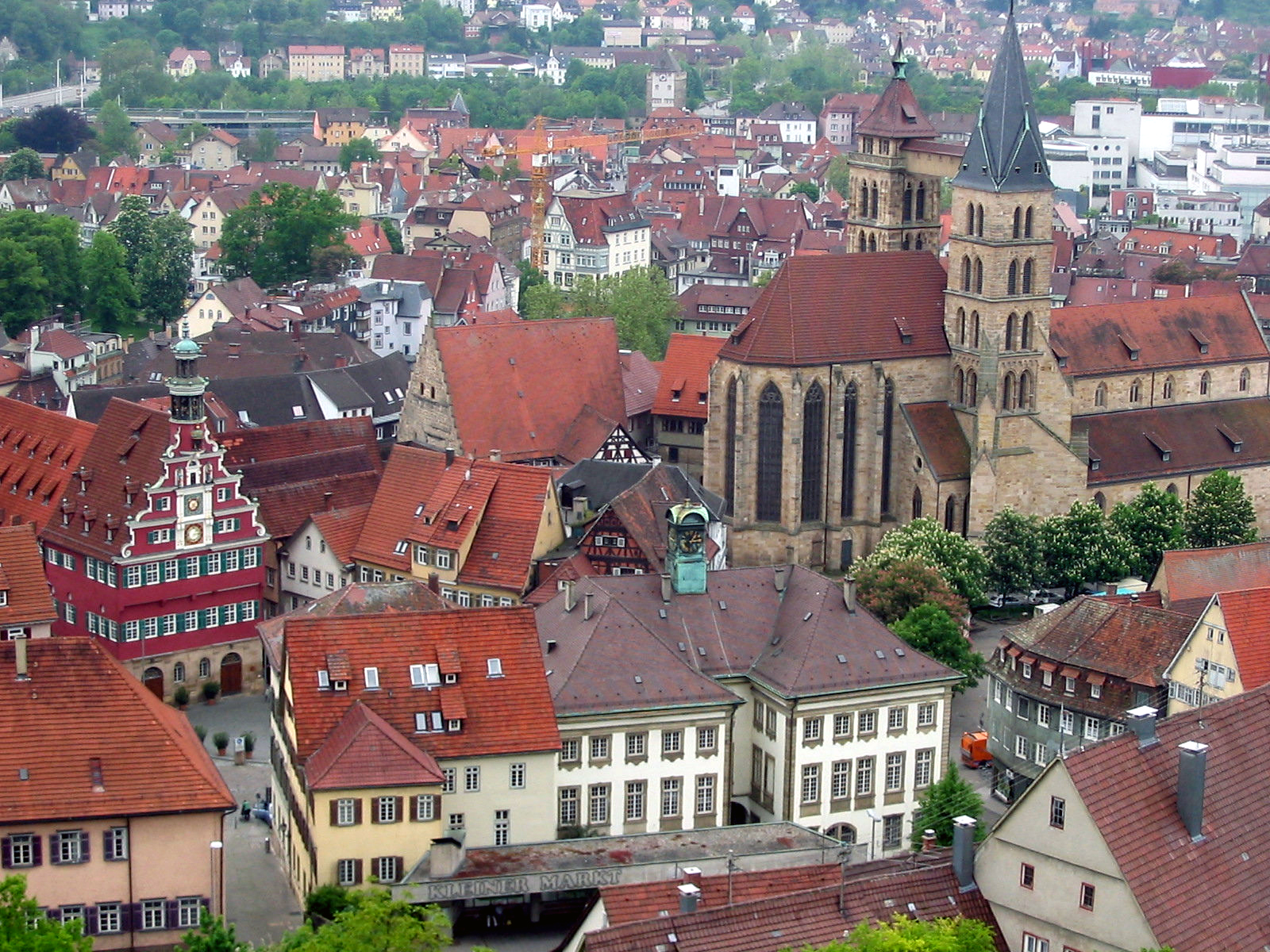 Das Zentrum der Altstadt von Esslingen, mit altem Rathaus (rosa, links), neuem Rathaus (unten, mittig) und Stadtkirche St. Dionys (rechts), aufgenommen von der Burg.